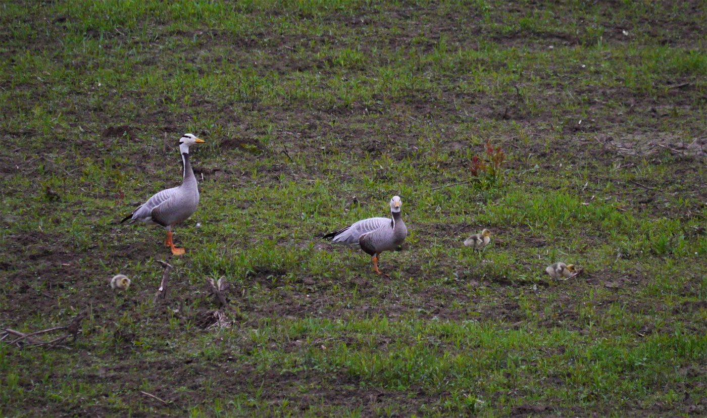 Deitsch: Paar Streifengänse (Anser Indicus) mit 3 Küken, 16. Mai 2013, Petite Camargue Alsacienne